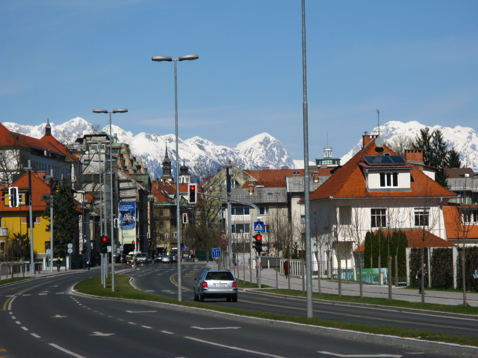 Barjanska cesta, Ljubljana - pogled proti Centru.